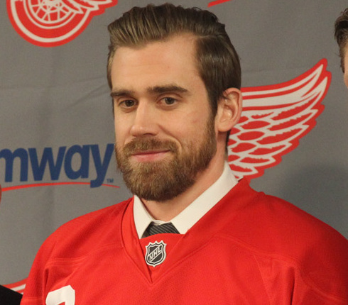 Ken Holland, Henrik Zetterberg and coach Mike Babcock.